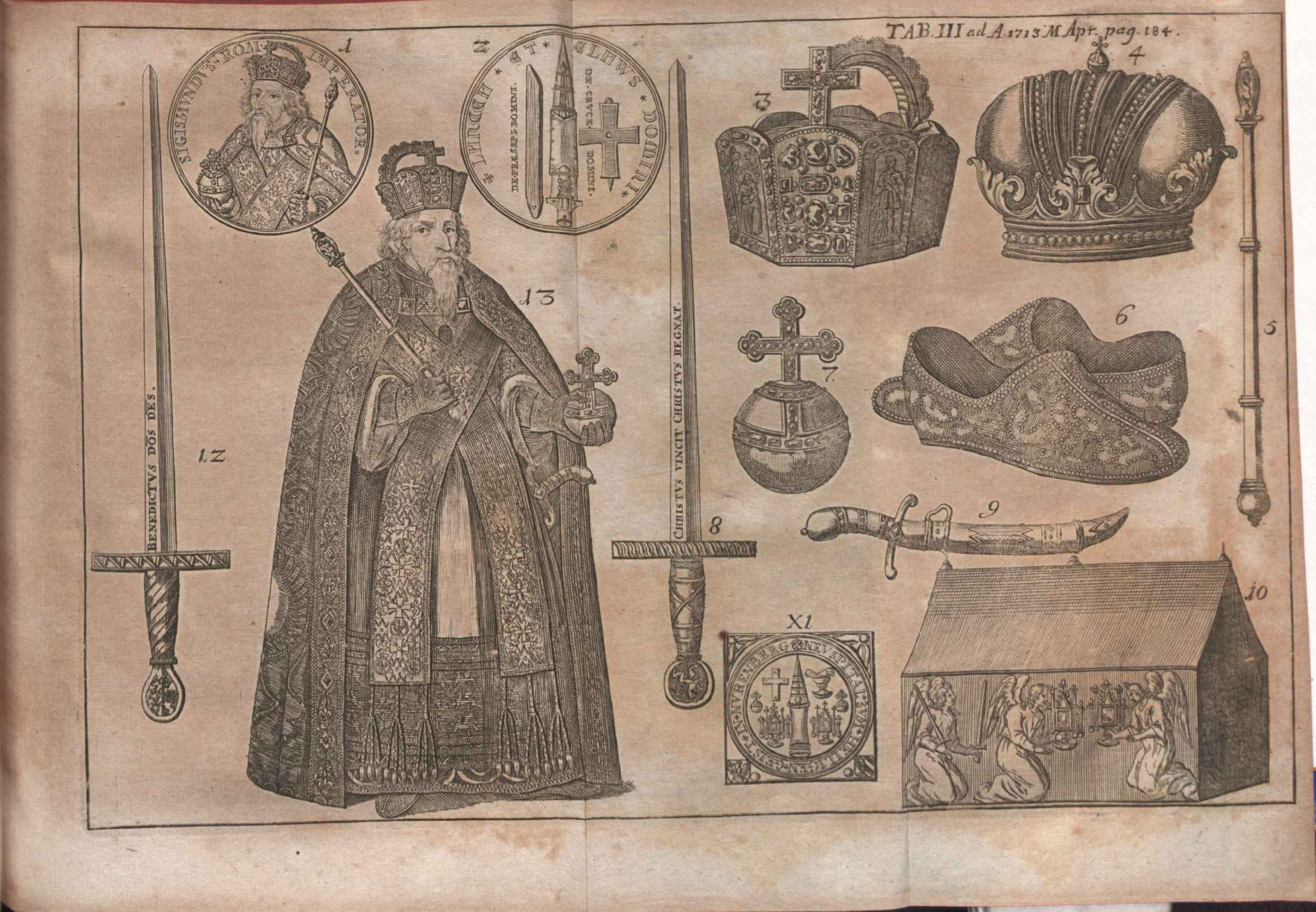 Illustration